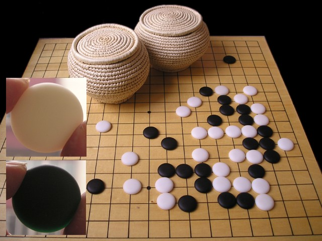 围棋：藤盒中国云子，自己拍摄